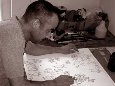 Peter Menne - Arbeitsplatz